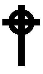 Кельтский крест